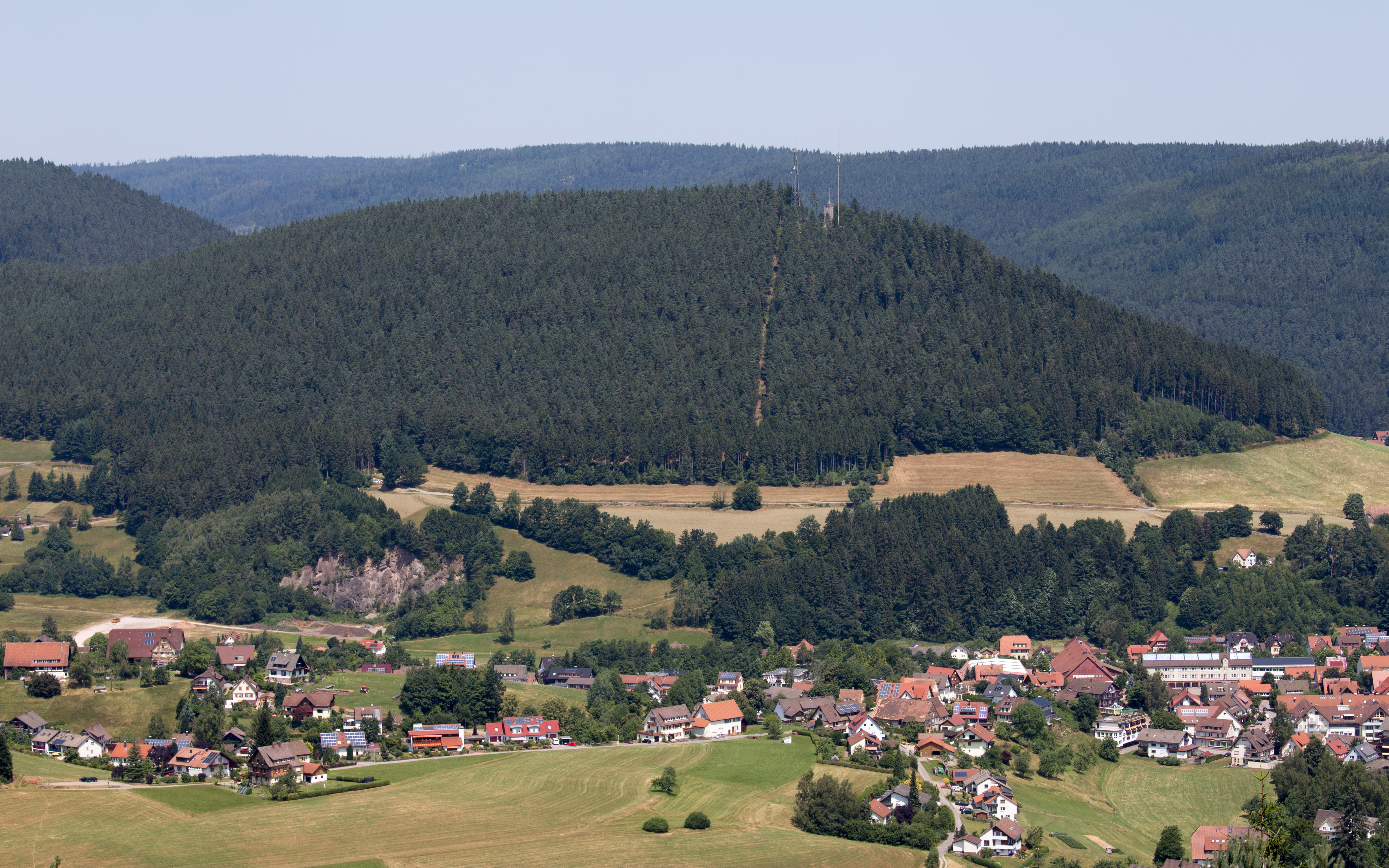 Blick vom Stöckerkopf auf den Rinkenkopf bei Baiersbronn im Schwarzwald